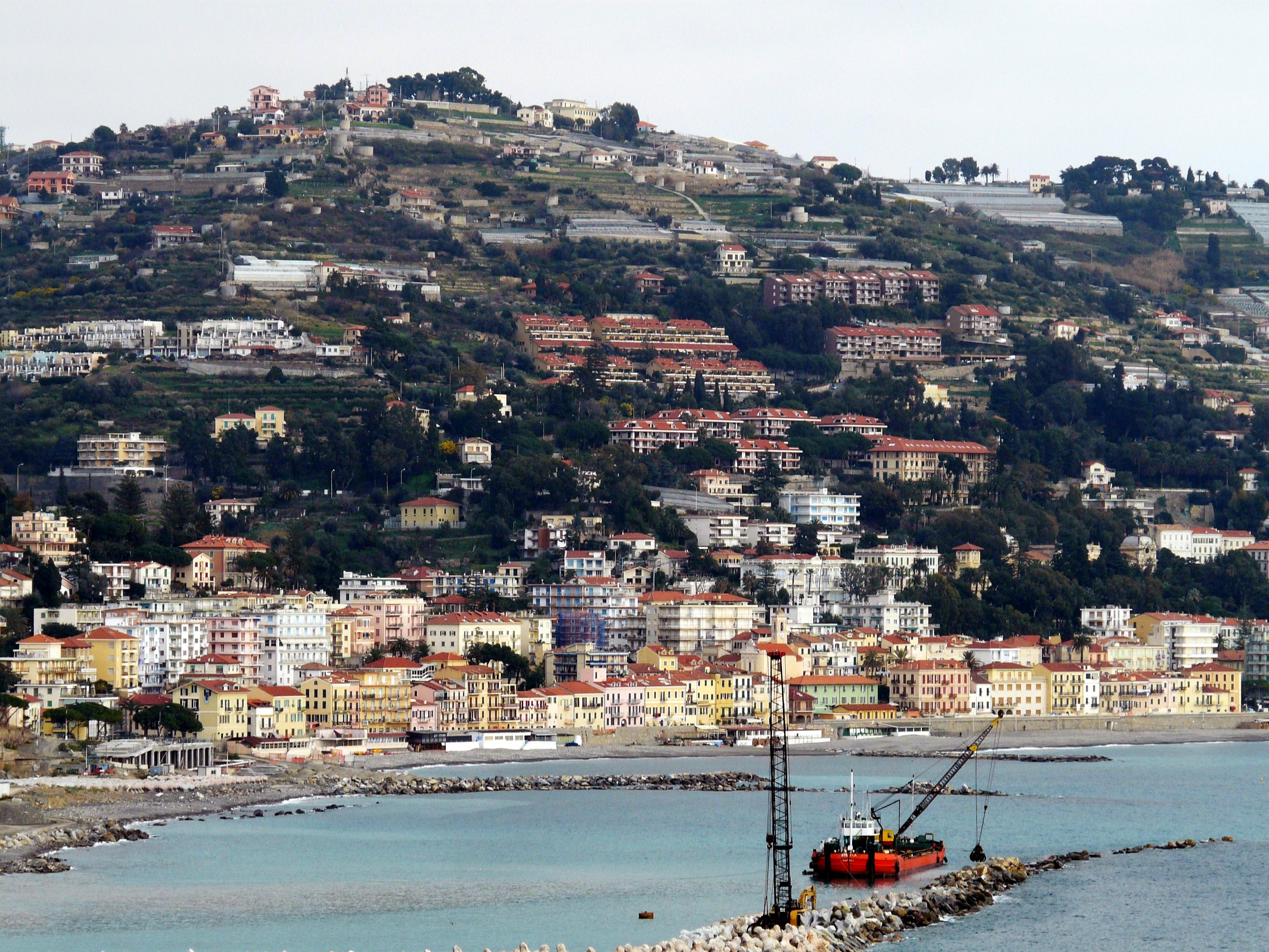 Ospedaletti, Liguria, Italia